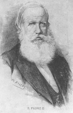 Imperador Pedro II gravador por Modesto Brocos.